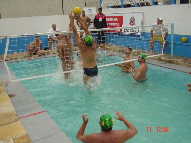 Uma partida de biribol